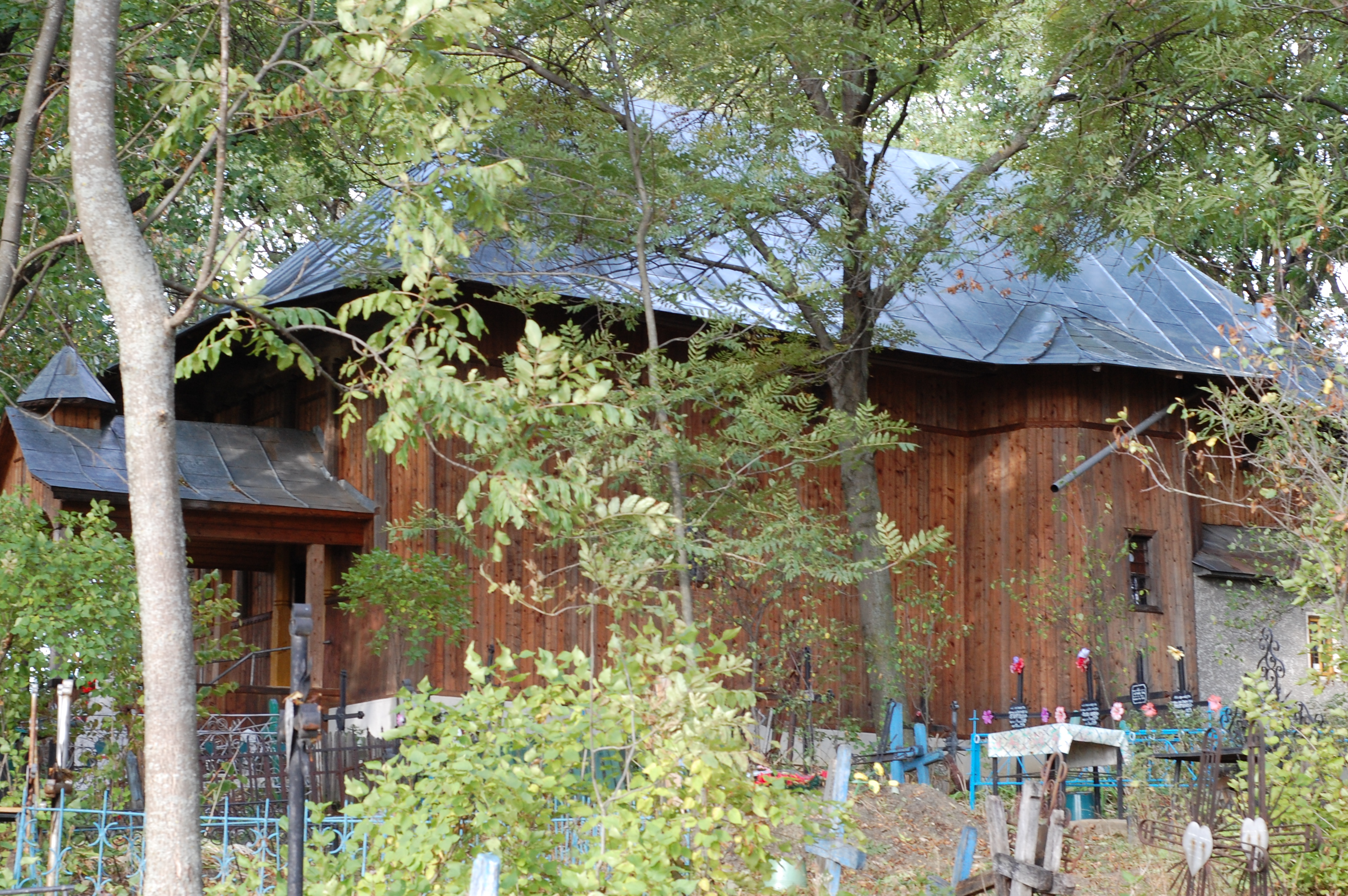 Biserica de lemn "Sfantul Nicolae" din Zăpodeni, judetul Vaslui